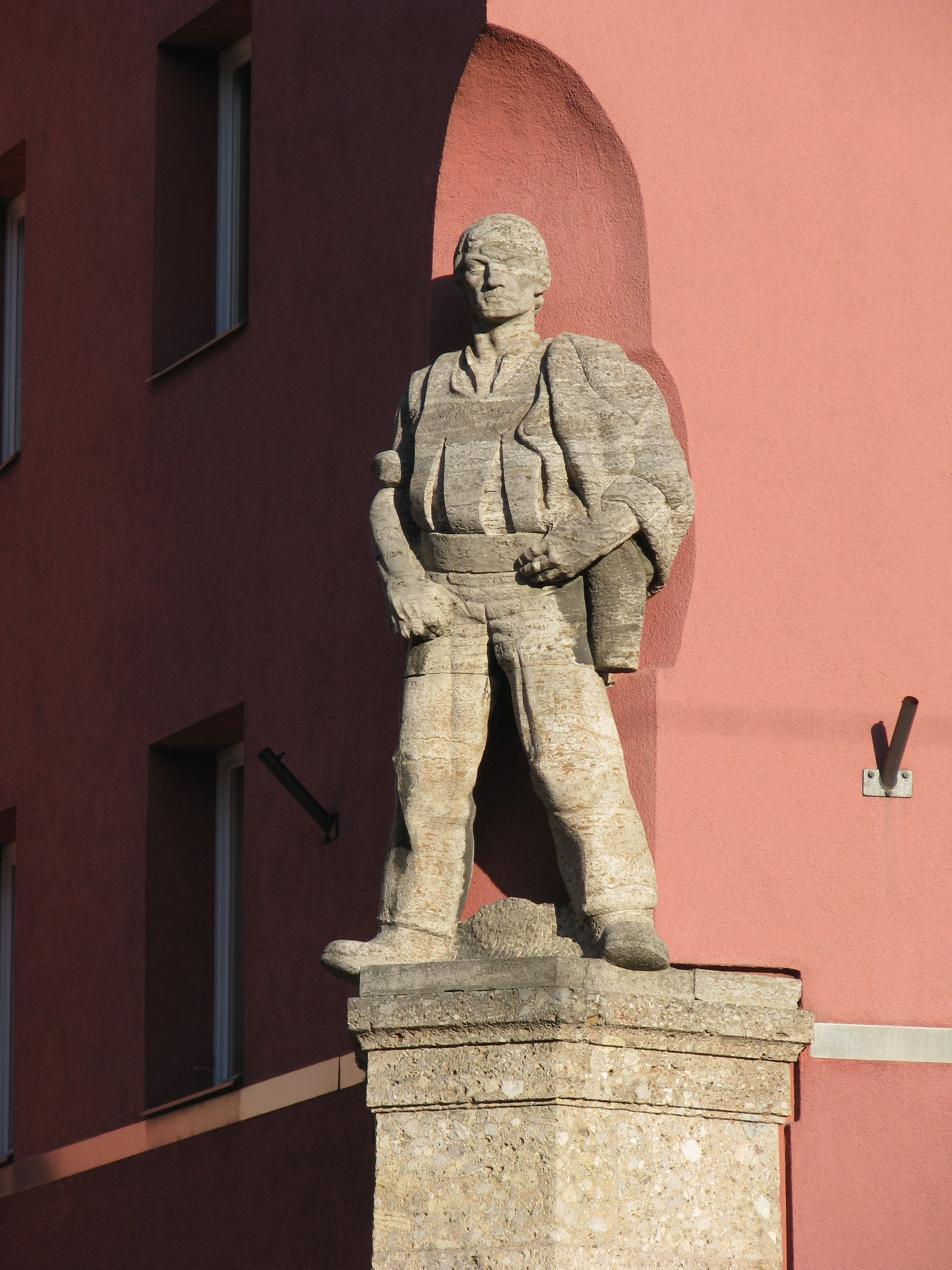 Statue eines Tirolers in Meraner Tracht von Albin Lanner an der Südtirolersiedlung, Speckbacherstr. 41–47, Innsbruck-Wilten This media shows the remarkable cultural object in the Austrian state of Tyrol listed by the Tyrolean Art Cadastre with the ID 69059. (on tirisMaps, pdf, more images on Commons)